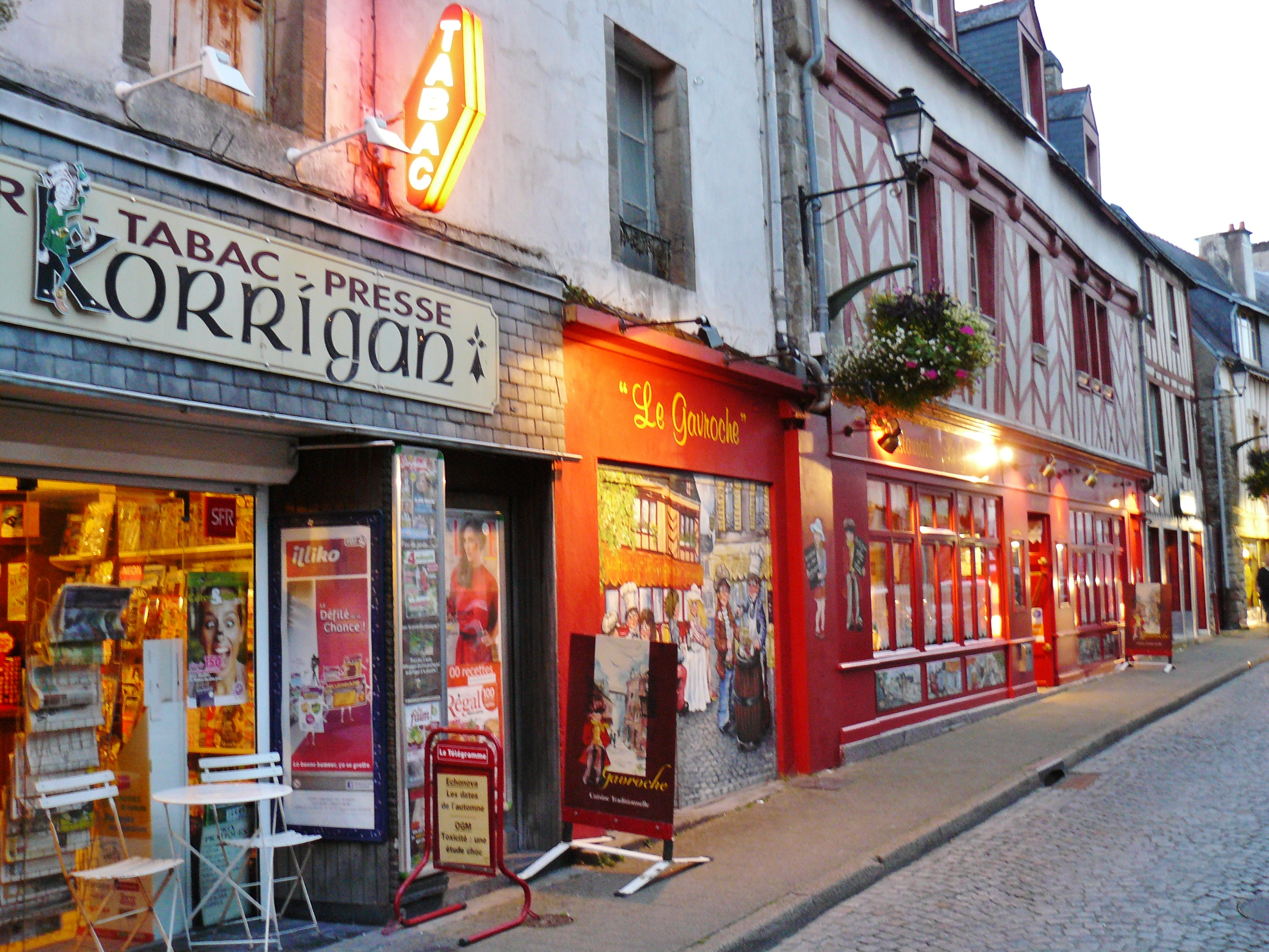 Pt Cabelio, Vannes